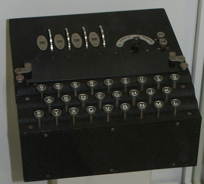 Enigma (vermutlich Modell D)